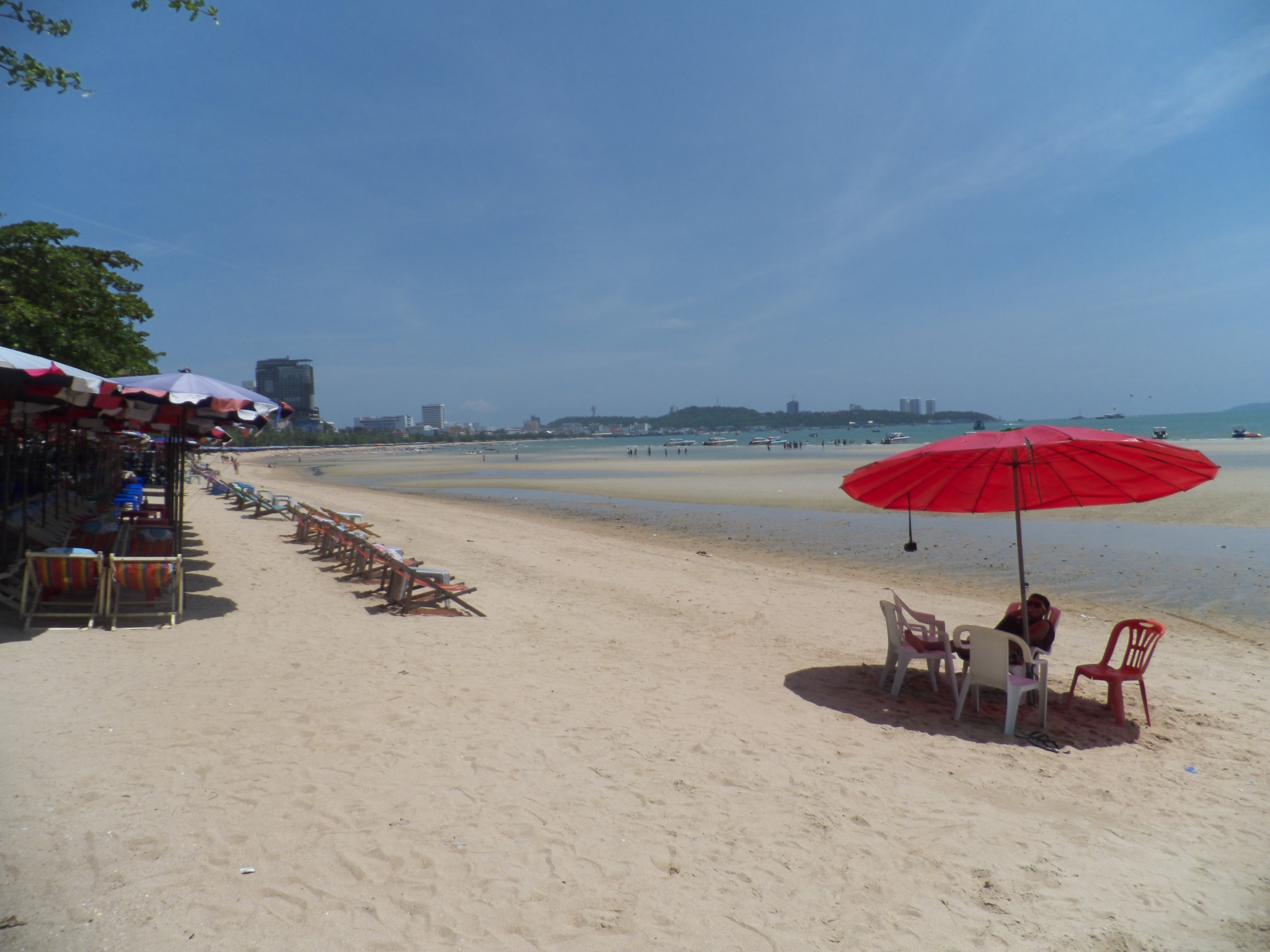 relax,c'est les vacances